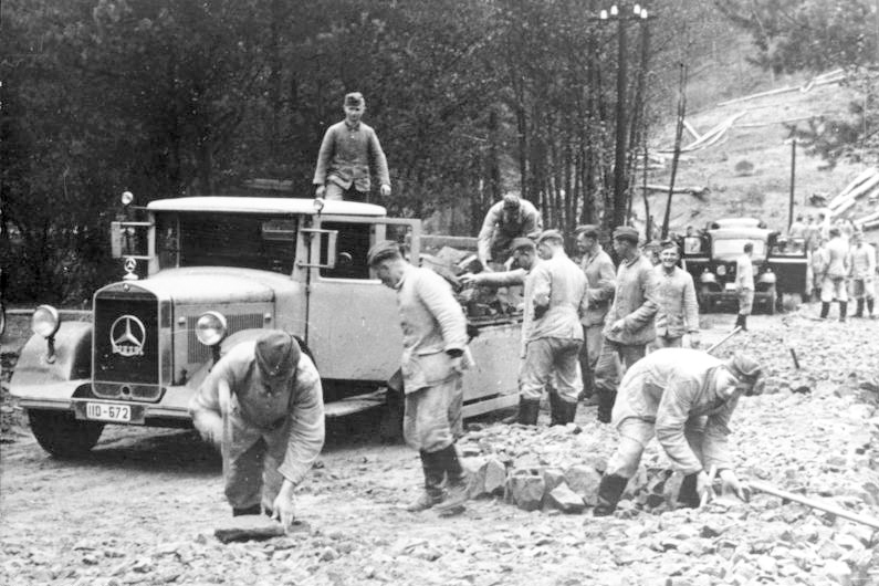 Westwall, RAD bei Wegebau ADN-ZB/Archiv Das faschistische Deutschland am Vorabend des II. Weltkrieges 1939/45 Bau der deutschen Westbefestigungen (Westwall) Oktober1938: Männer des faschistischen Reichsarbeitsdienstes bei Wegebauarbeiten. Aufnahme: Gutjahr [Scherl Bilderdienst]